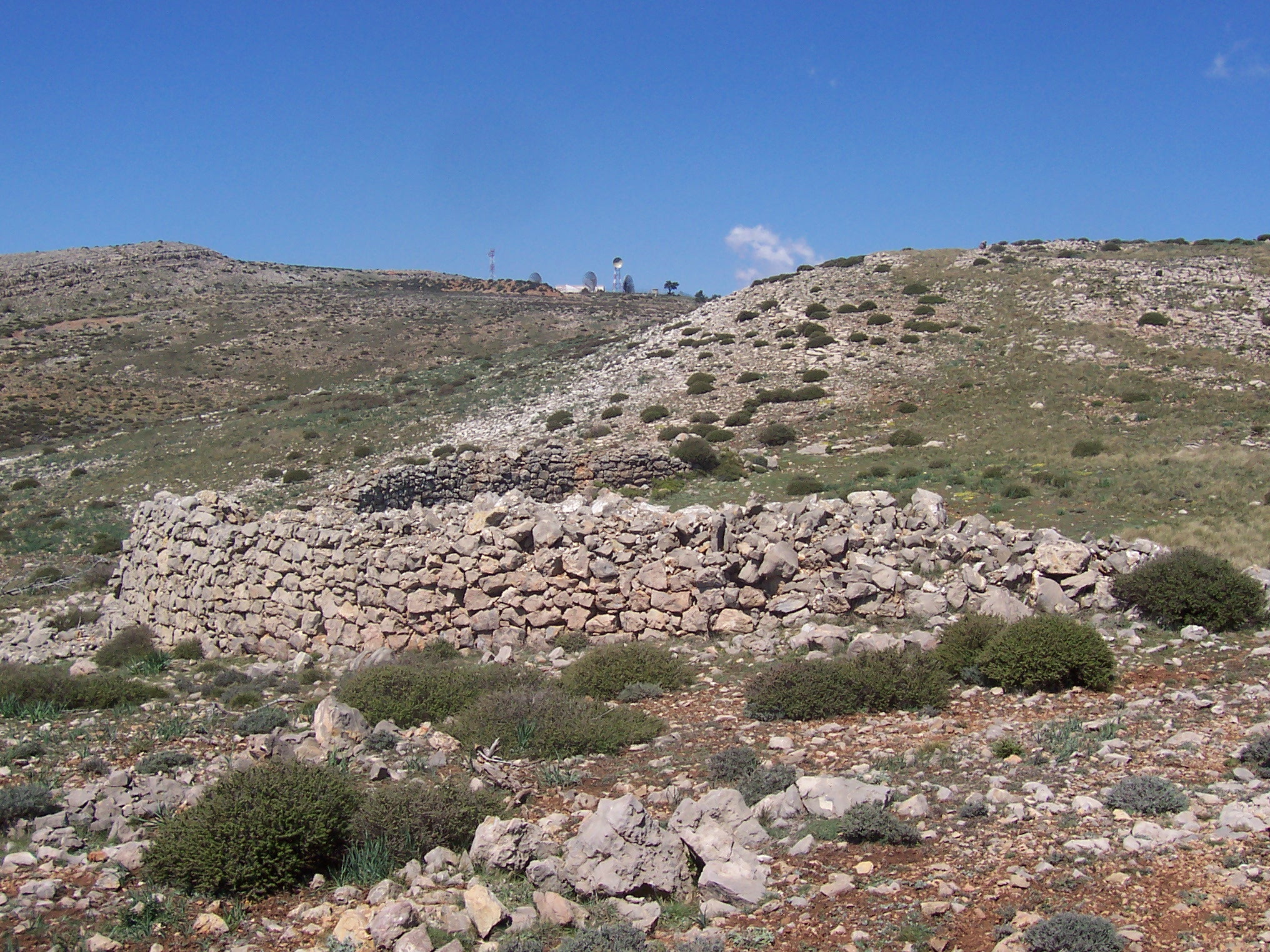 Ventisquero situado en el cerro del resinero próximo al vértice Salada. Lugar destinado a acumular la nieve de las ventiscas.